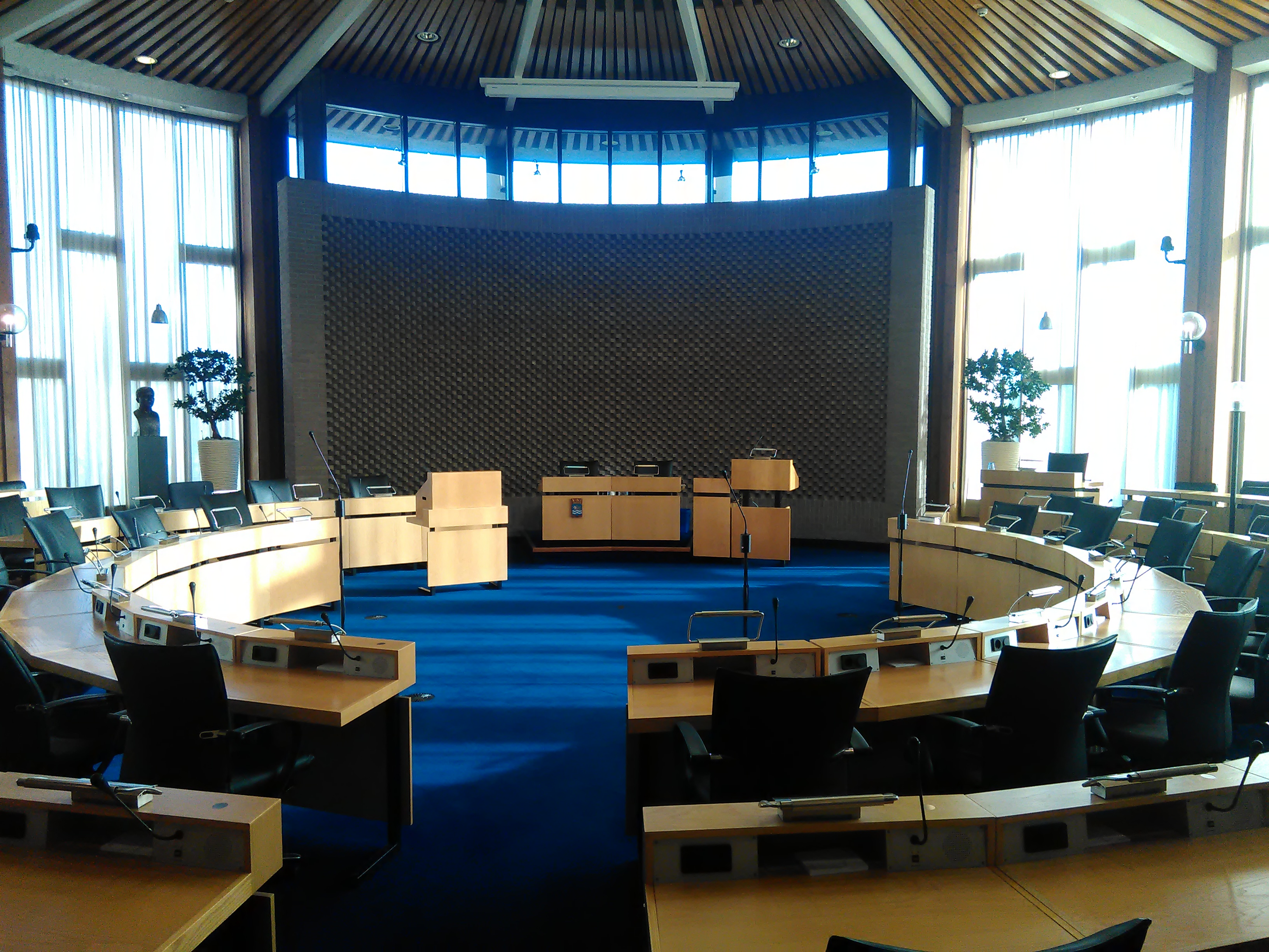 Raadzaal gemeenteraad Haarlemmermeer